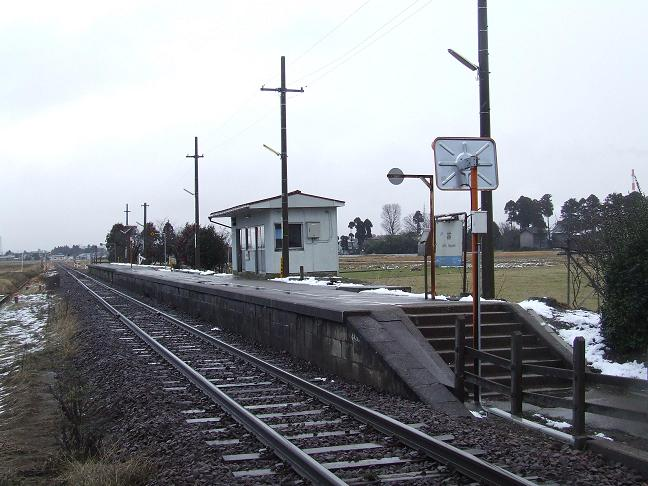 JR林駅